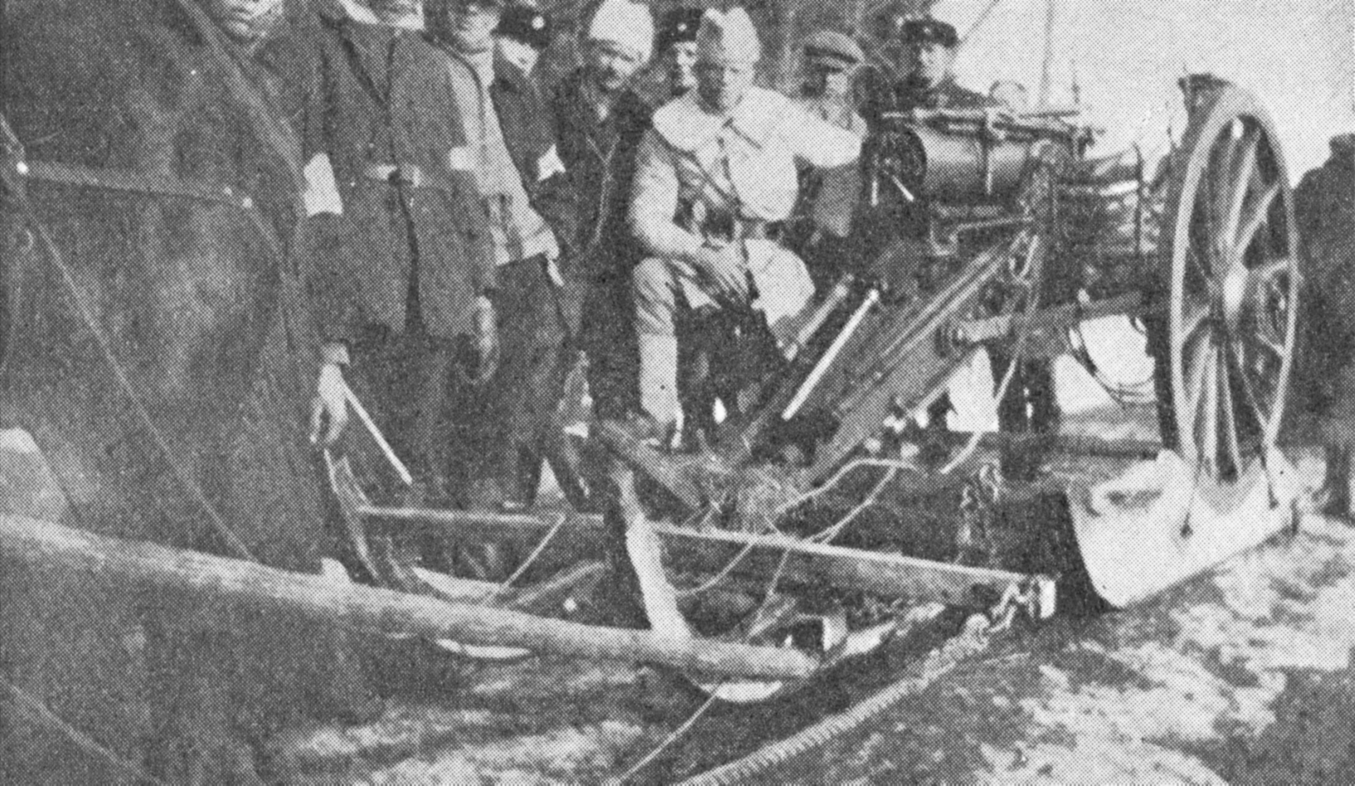 Description